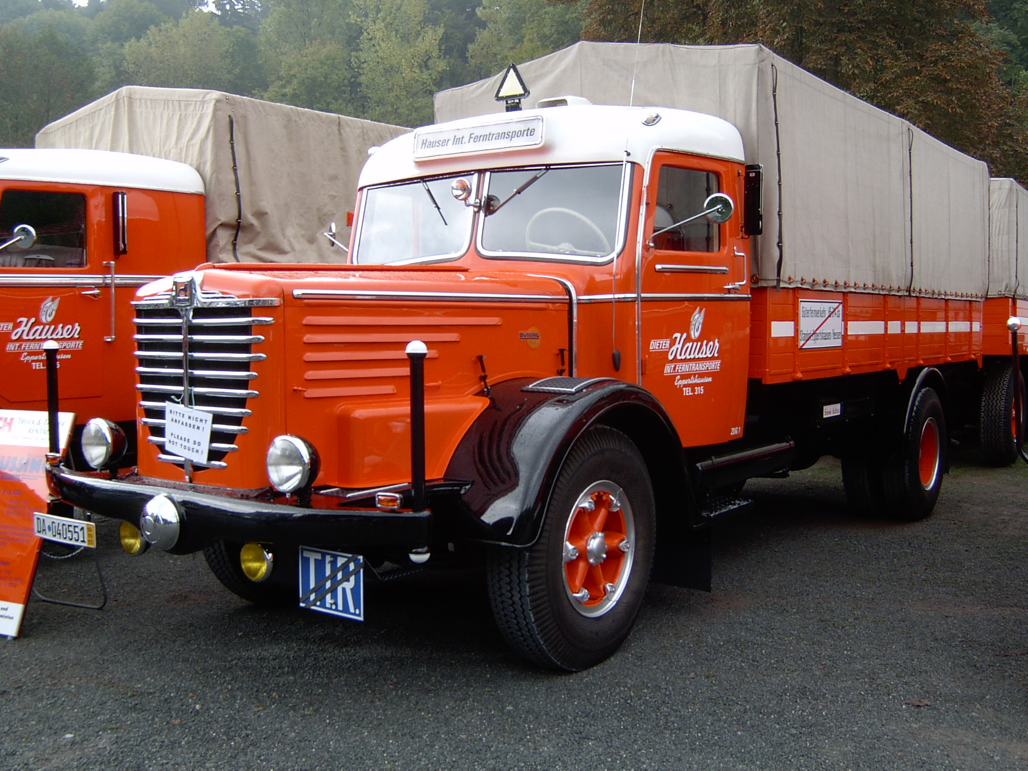 Büssing 8000 mit Schwalbennest (Löschen) (Aktuell) 12:26, 29. Jan 2006 . . 8000S13 (Diskussion) . . 2048 x 1536 (788714 Byte) (Büssing 8000 mit Schwalbennest ) * (Löschen) (Zurücksetzen) 23:07, 17. Dez 2005 . . 8000S13 (Diskussion) . . 400 x 300 (40085 Byte) (* Bildbeschreibung: Büssing 8000 mit Schwalbennest * Quelle: 1.Nutzfahrzeug-Veteranenschau in Weilburg * Fotograf/Zeichner: selbst fotografiert * Datum: 2003 Bild-PD )